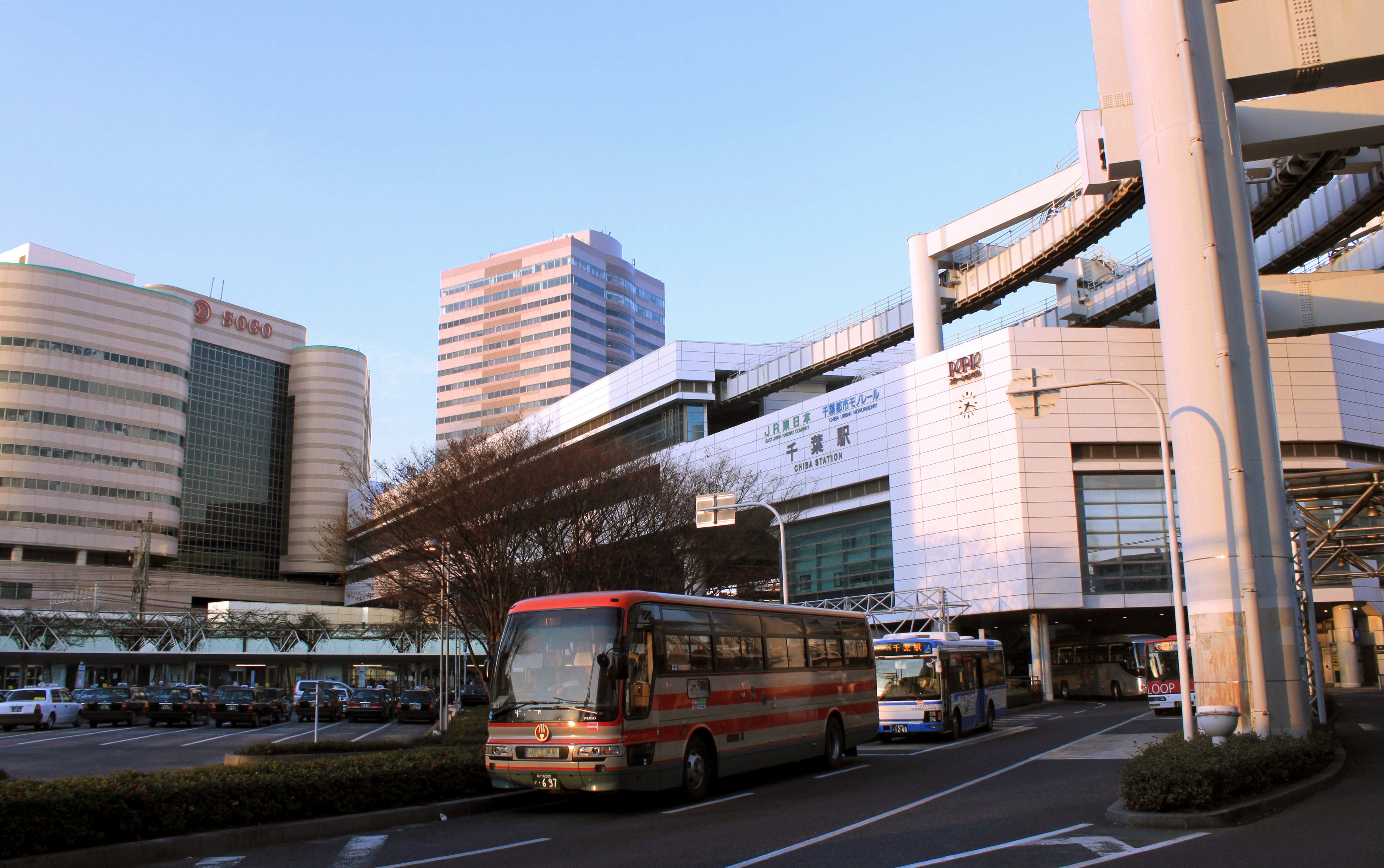 千葉駅